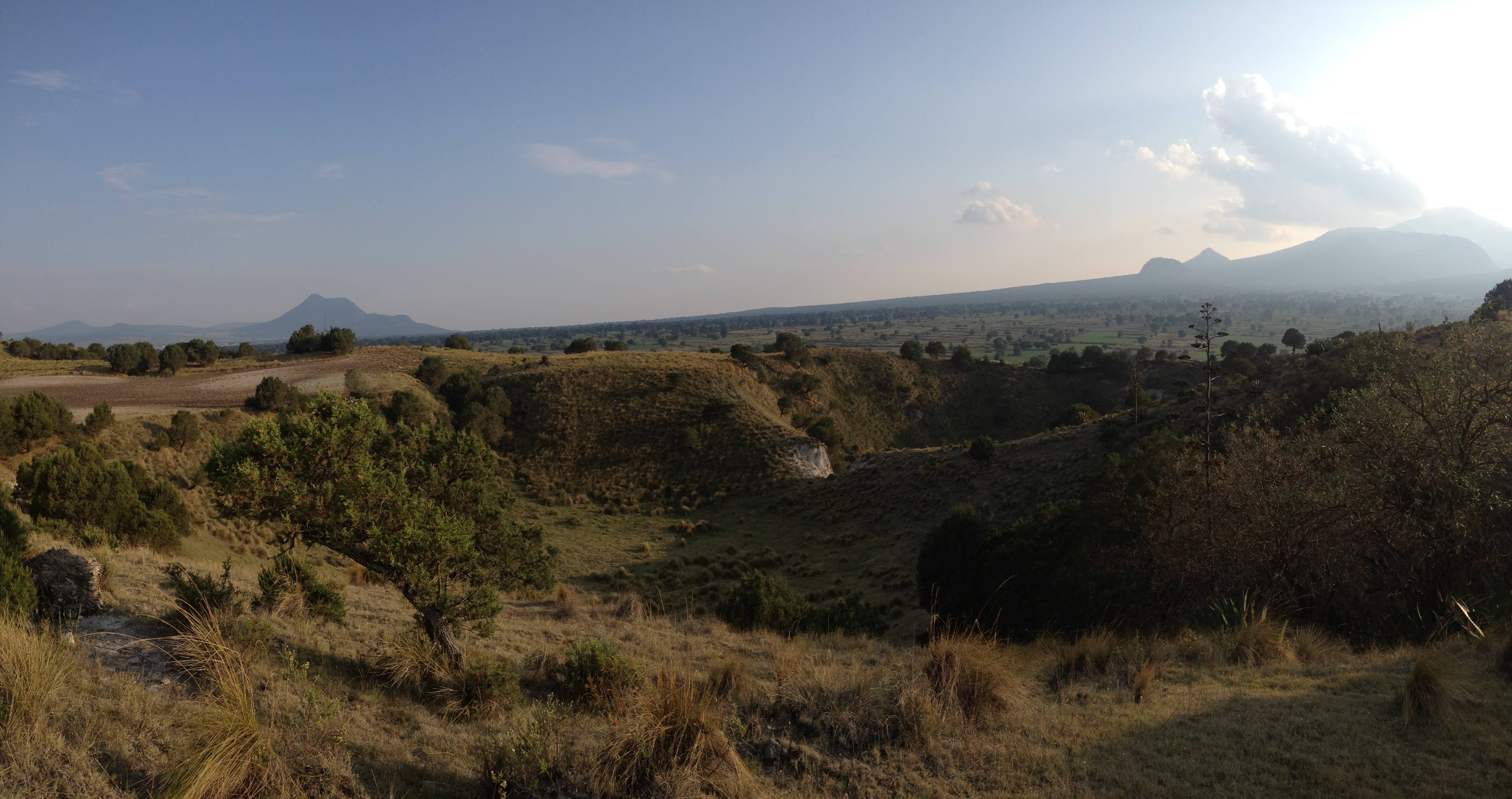 Vista de dos de los cráteres. Al fondo, los cerros Pinal y Tintero, del lado izquierdo; del lado derecho, el Oclayo, Xaltonalli, el Filete y la Malinche